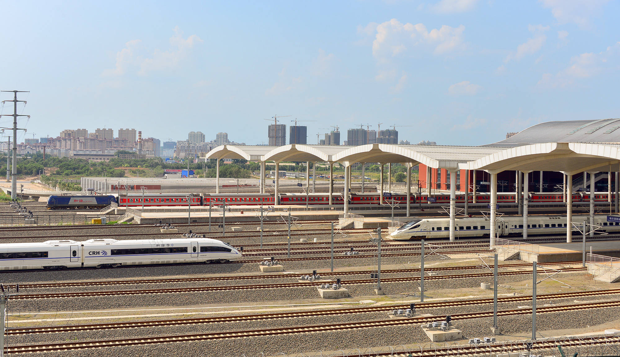 客车K1548次哈尔滨西站通过